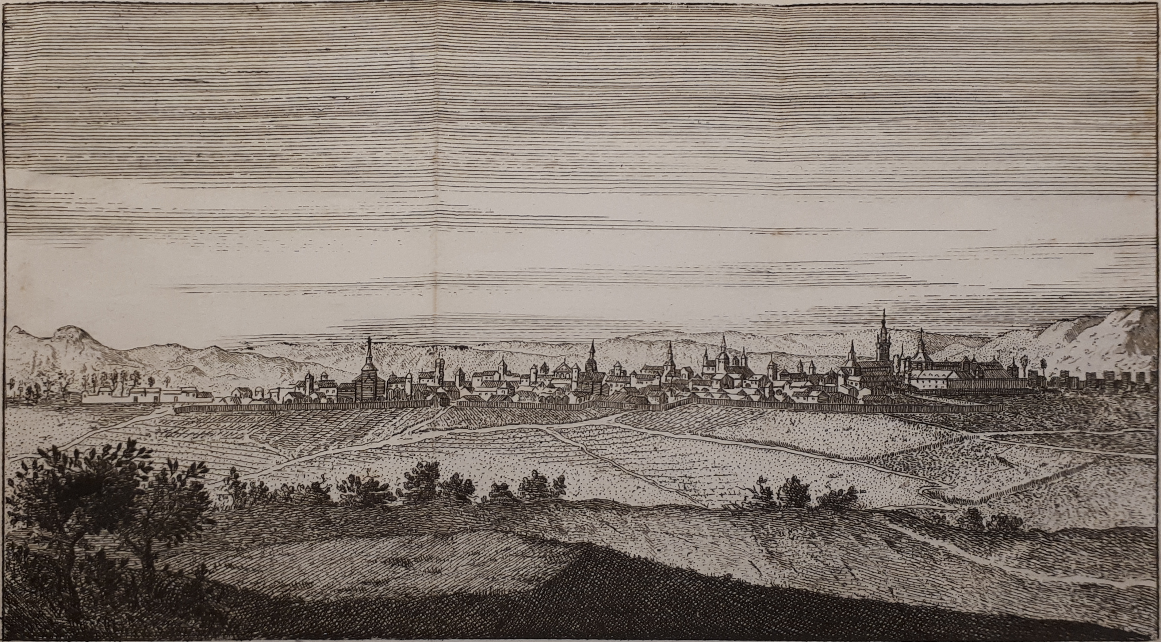 Vista panorámica de Alcalá de Henares (Comunidad de Madrid - España). Copia del aguafuerte de Juan Francisco Leonardo de 1687. Publicada, en 1787, en la tercera edición del "Viage de España" de Antonio Ponz.